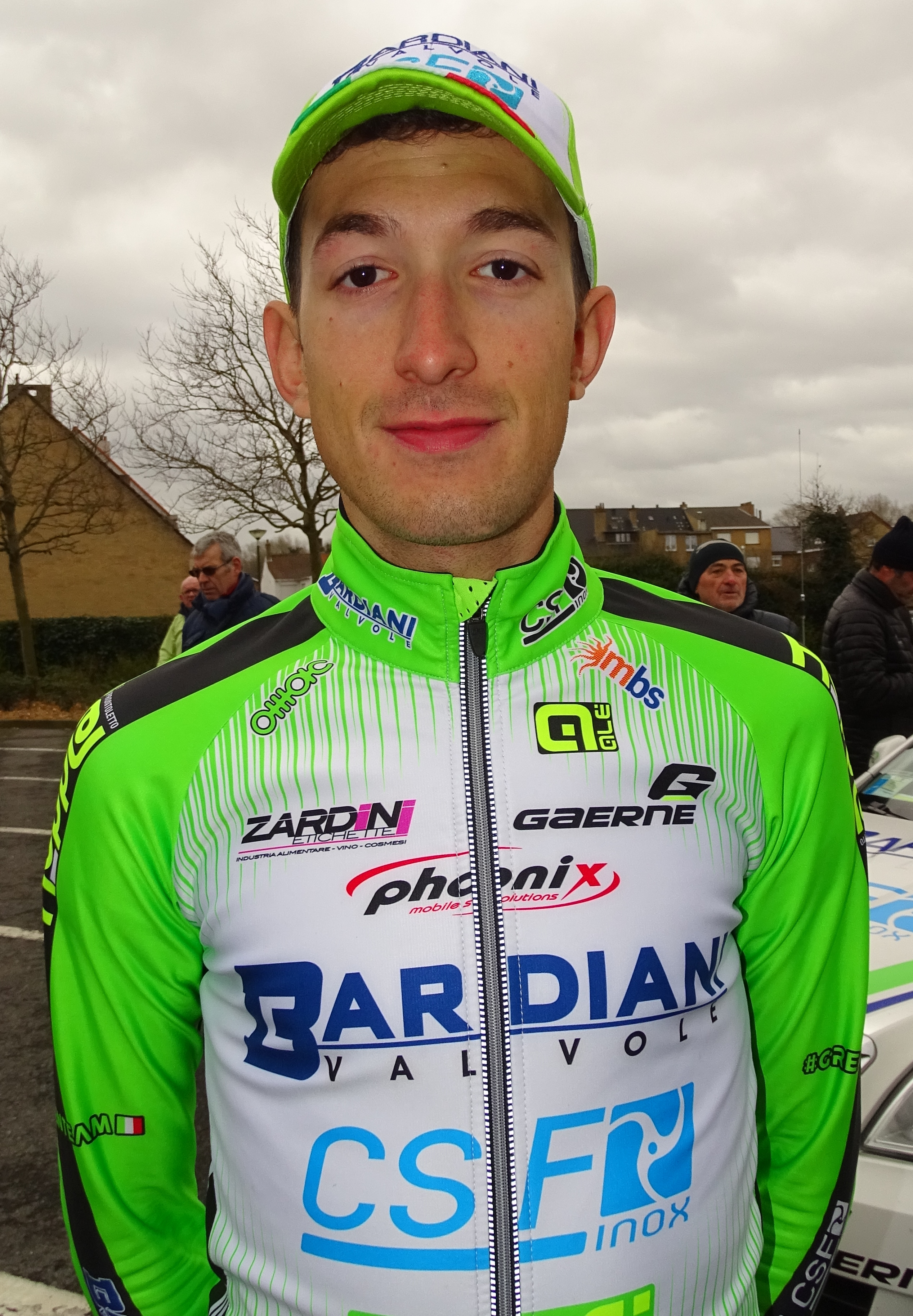 Reportage réalisé le mardi 31 mars à l'occasion de du départ de la première étape des Trois jours de La Panne 2015 à La Panne, Belgique.